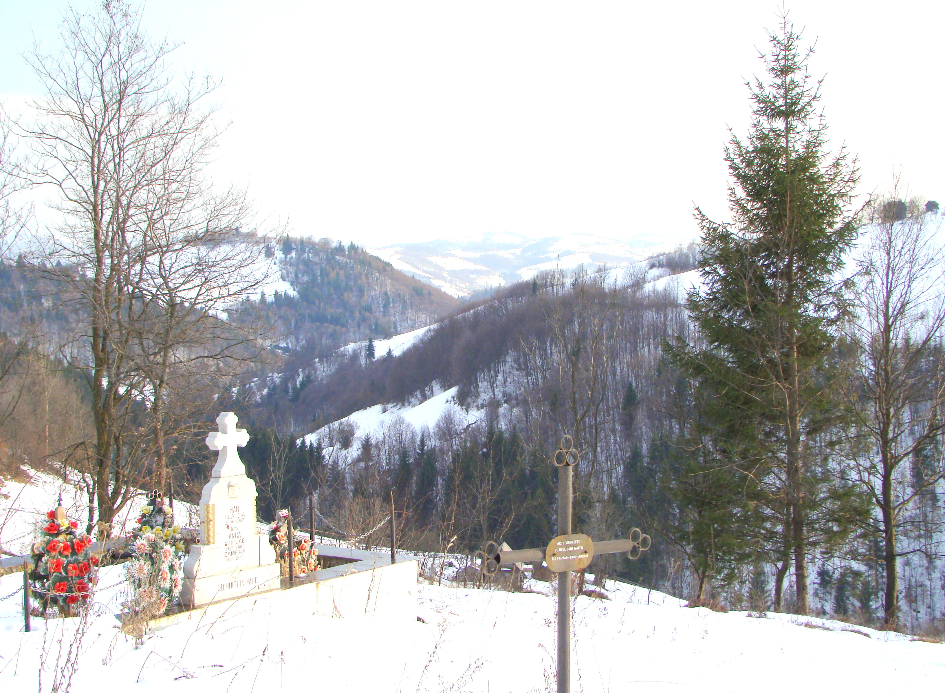 Certege, județul Alba.